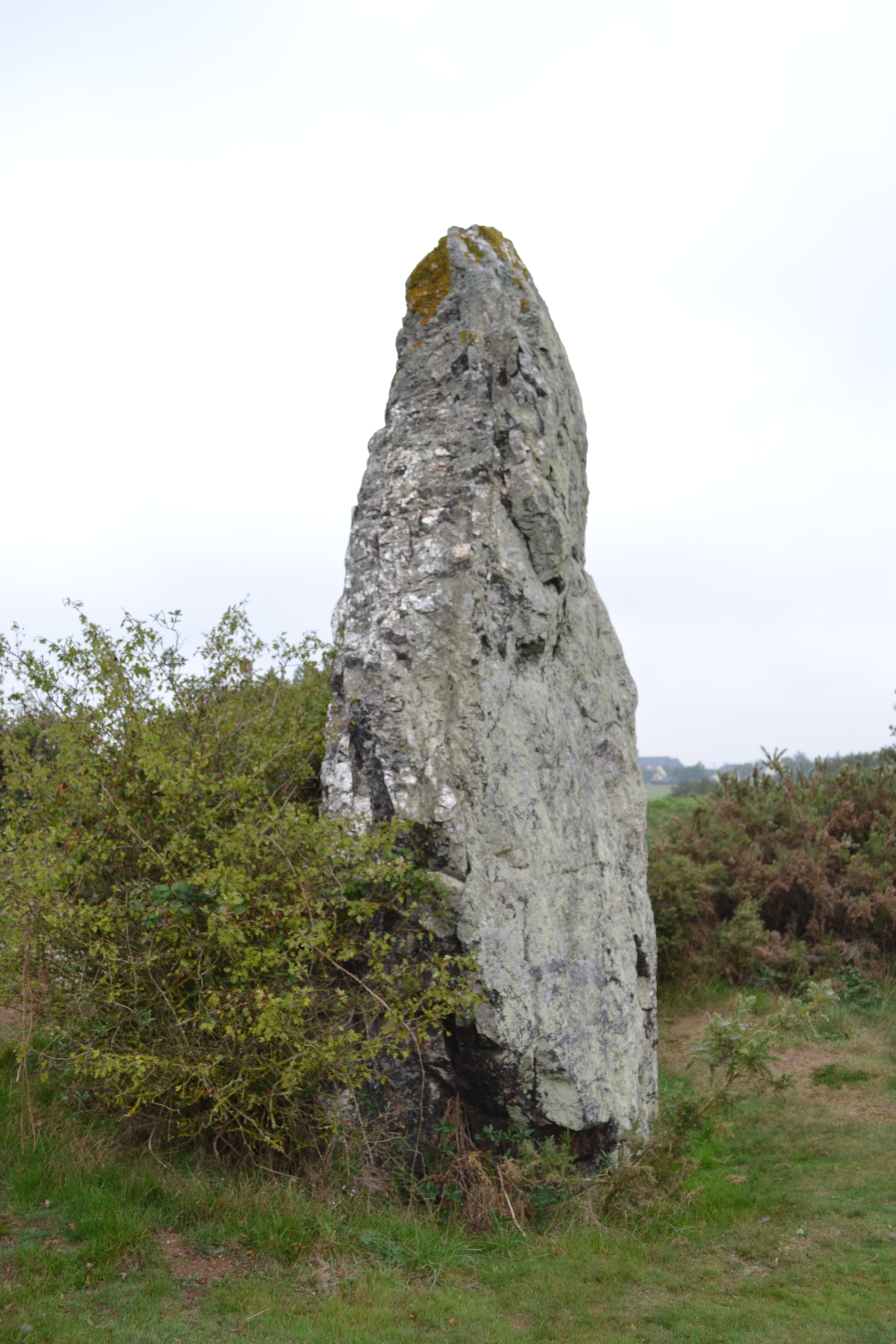 Menhir de Pierre-Longue, Pléchâtel, Ille-et-Vilaine